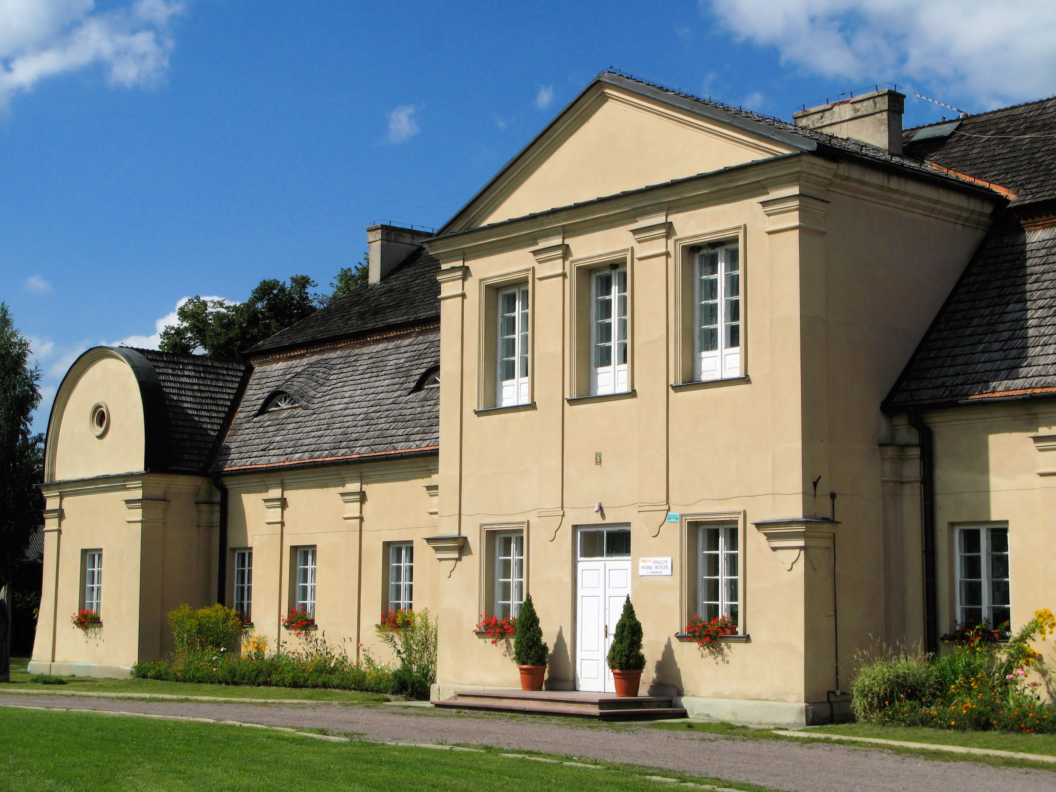 Dorohusk - zespół pałacowy (XVIII w.): - pałac - pozostałości oficyn - park zabytek nr rejestr. A/573 z 26.02.1972)